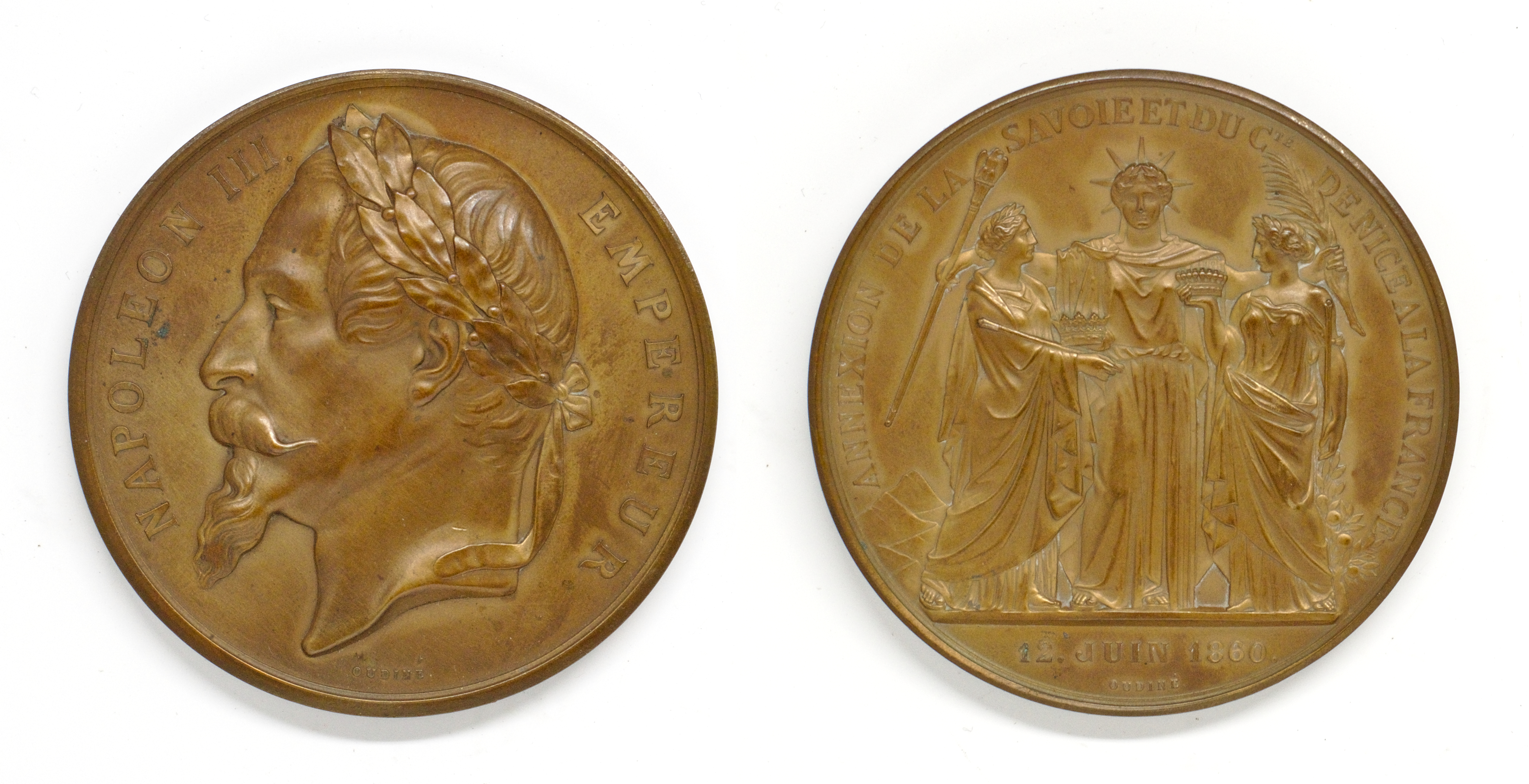 Médaille de Napoléon III - Annexion de la Savoie et du Conté de Nice - Oudiné - 1860